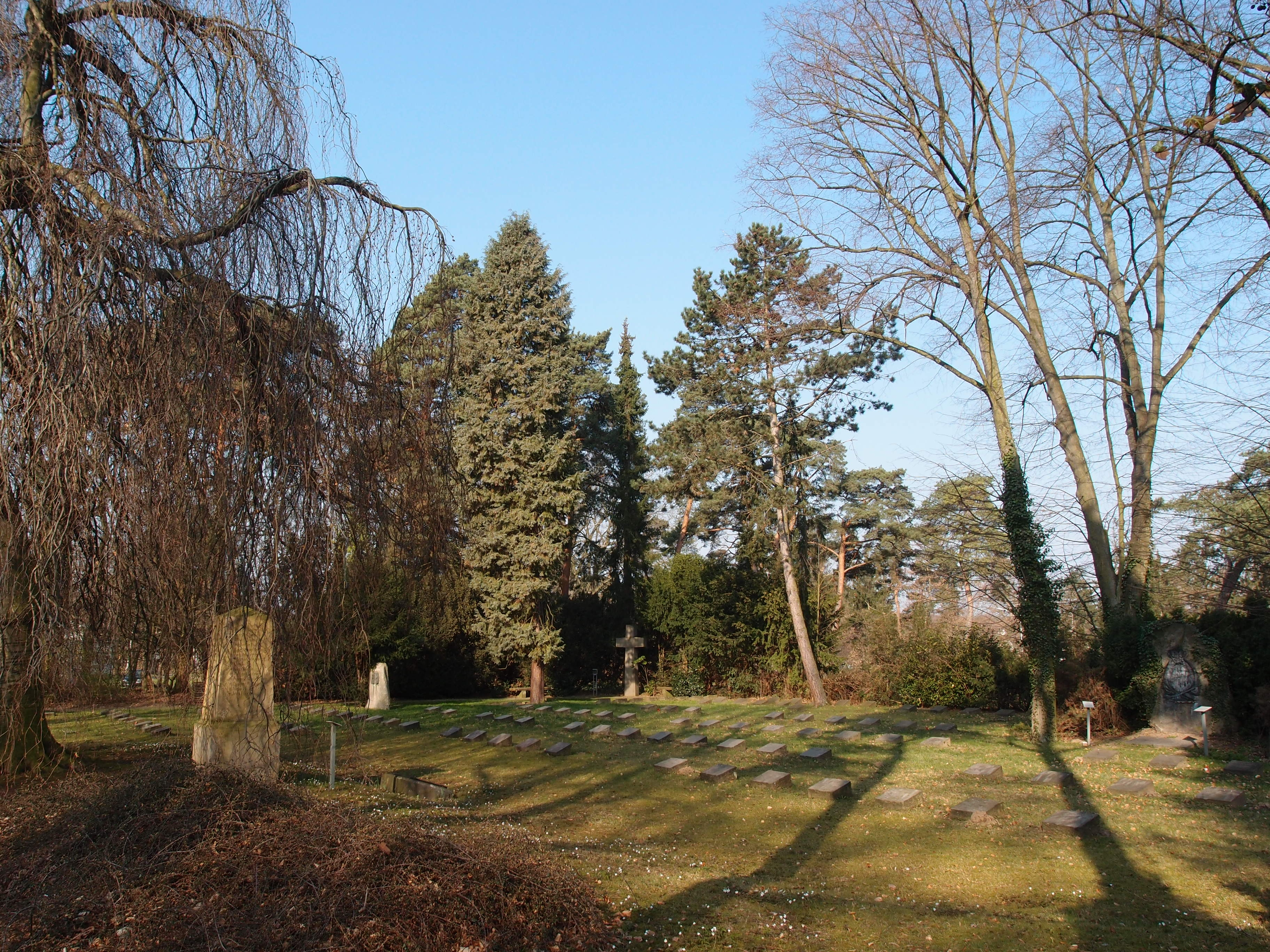 Militärfriedhof in der Lw-Kaserne Köln-Wahn Datum: 24.03.2012 Urheber: M. Pfeiffer alias Benutzer:Gordito1869 privates Fotoarchiv des Urhebers Hinweis: In der Lw-Kaserne Wahn besteht (außerhalb von mil. Sperrzonen) grundsätzlich kein Fotografierverbot